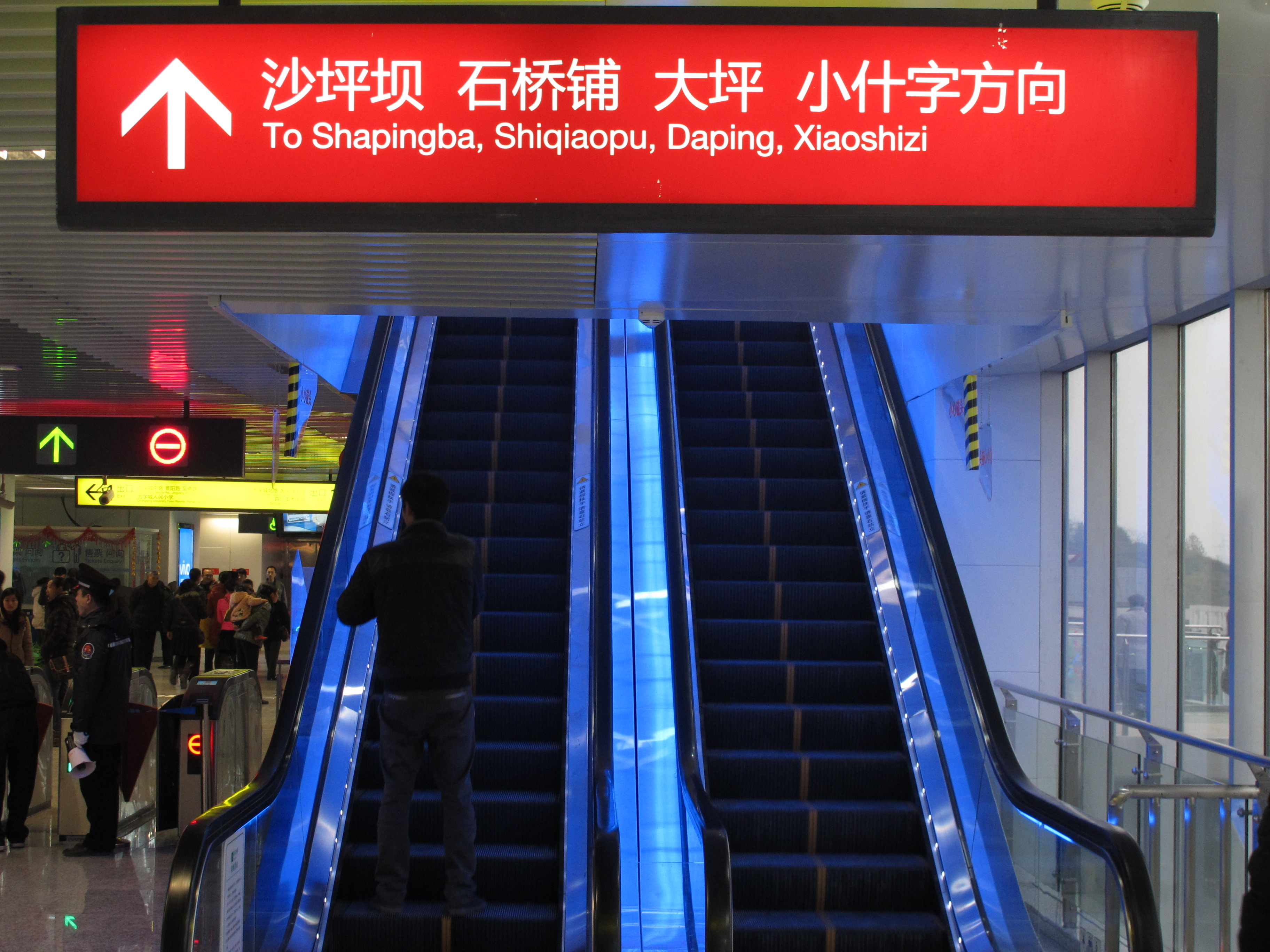 重庆轨道交通1号线 大学城站内部指引指向东面的几个重要车站